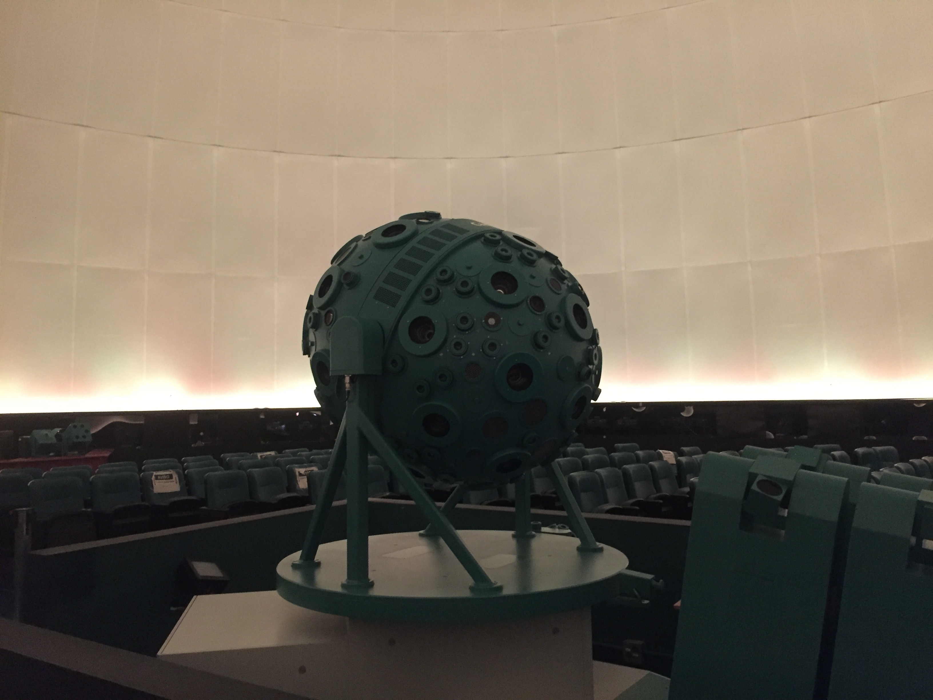 Projetor utilizado nas simulações (apresentações) realizadas no Planetário do Carmo.